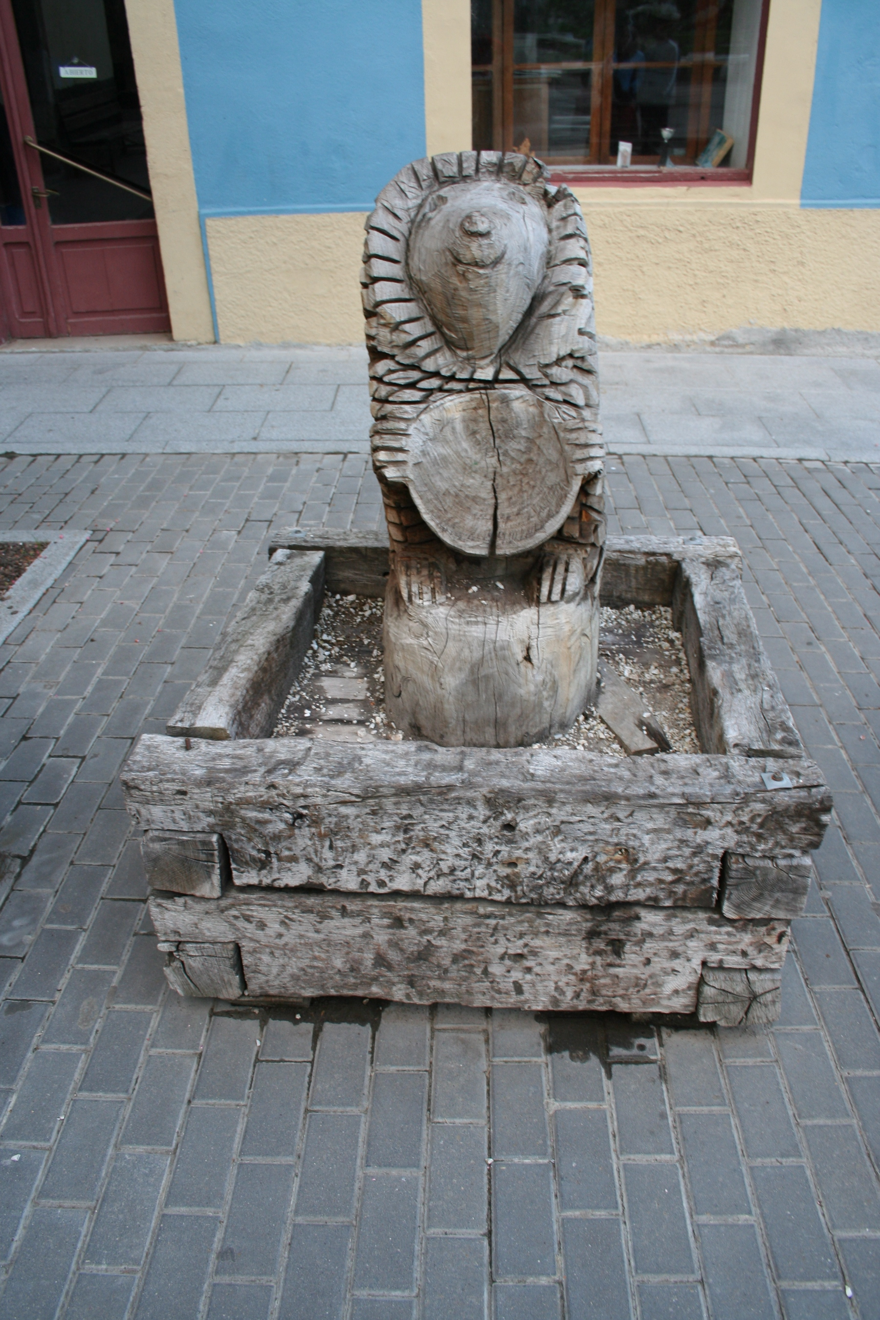 Navelgas